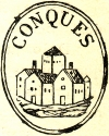 Segell municipal de Conques escanejat d'un document de fa més de 100 anys (Isona i Conca Dellà, Pallars Jussà)